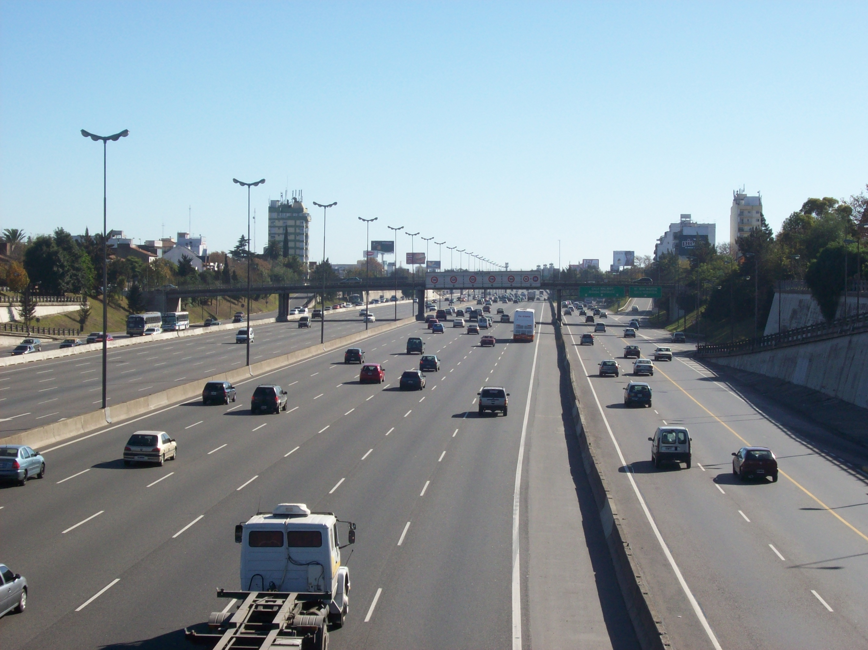 Acceso Norte (Ruta Nacional 9) desde el puente de la calle Melo hacia el noroeste, en Florida, partido de Vicente López, Provincia de Buenos Aires, Argentina.